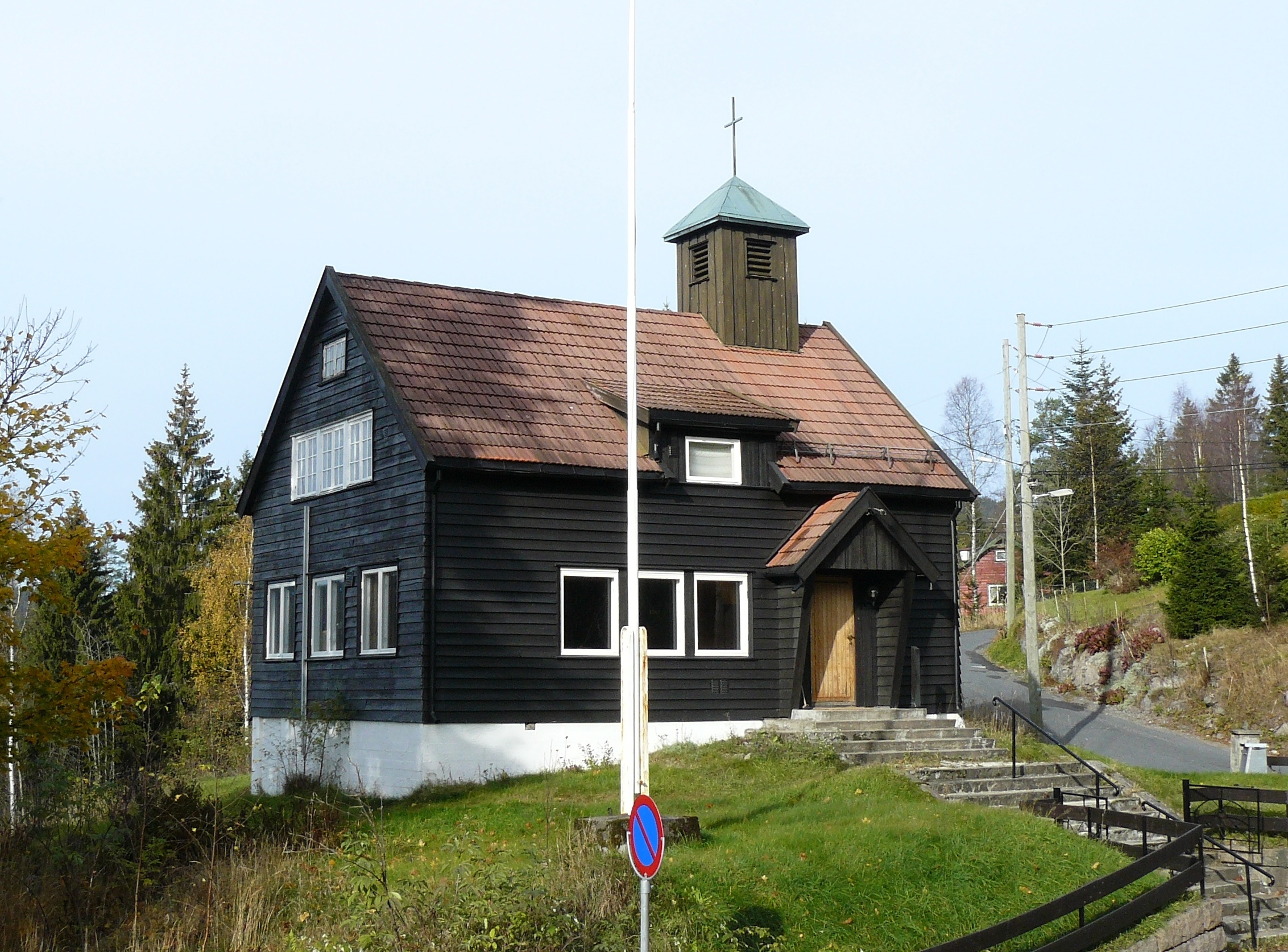 Sørbråten chapel, Oslo